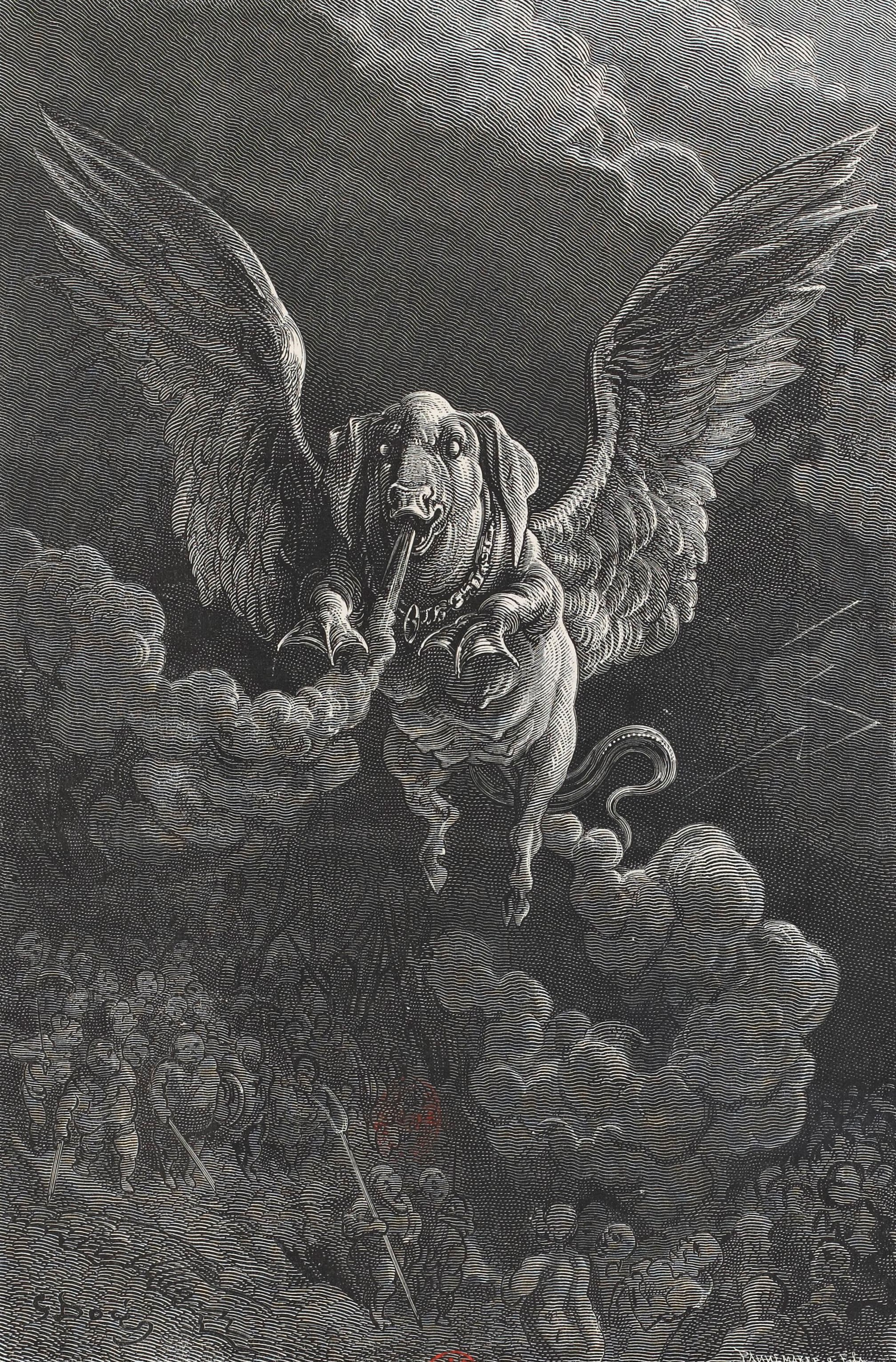 Mardi-Gras, un pourceau-volant, est le dieu et créateur des Andouilles dans le Quart Livre de Rabelais. Illustrations de Gustave Doré en 1873, éditions Garnier Frères